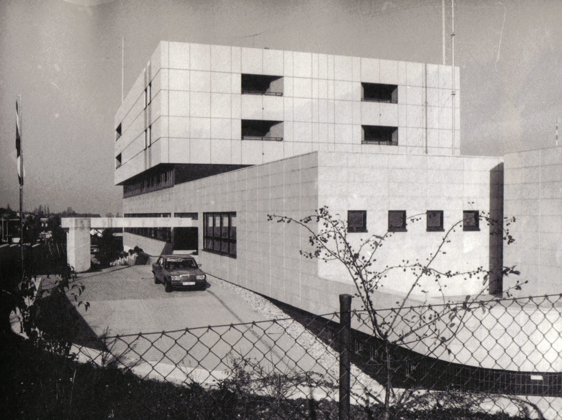 Veľvyslanectvo ČSSR v Bonne. Autori: Ing. Arch. Ľ. Jendreják, Ing. Arch. L. Kušnír, Csc., Akad. Arch. Ing. P. Puškár, Ing. Arch. J. Silinger, 1980, 1985